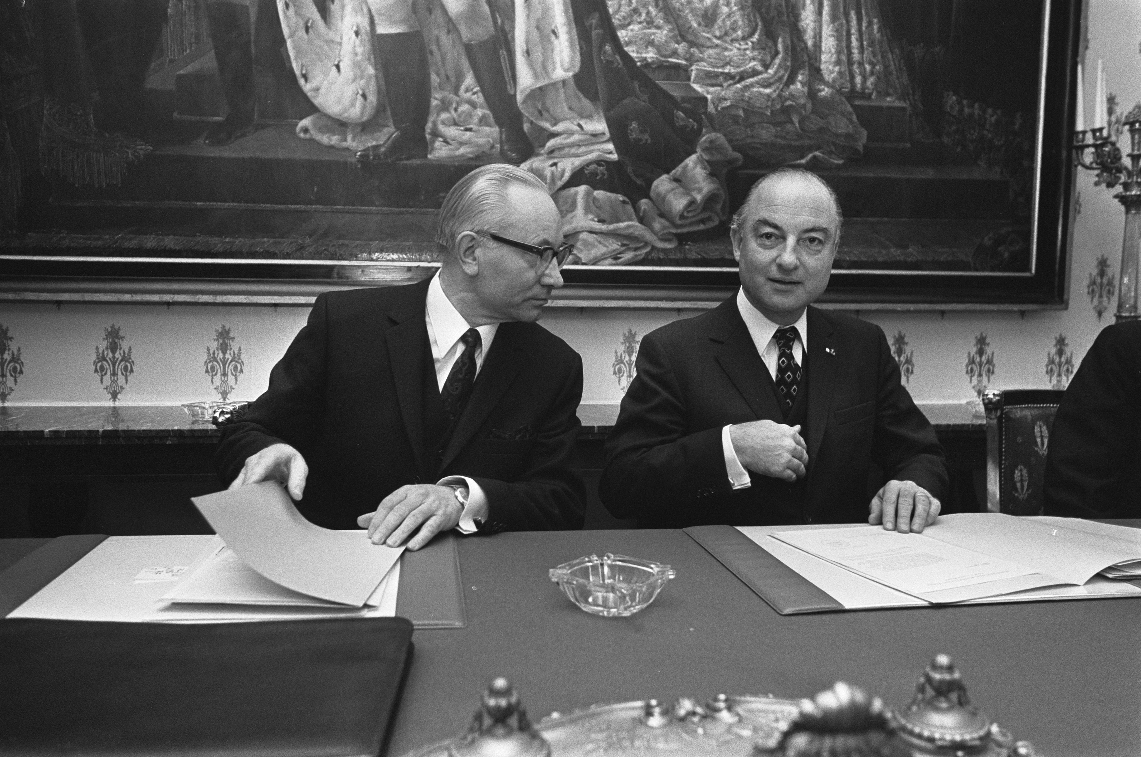 Collectie / Archief : Fotocollectie Anefo Reportage / Serie : [ onbekend ] Beschrijving : Minister Schmelzer (r) en Russische Ambassadeur Lavrov tekenen stukken inzake economische, industriele en technische samenwerking Datum : 25 januari 1973 Trefwoorden : ambassadeurs, ministers Persoonsnaam : Schmelzer, Norbert Fotograaf : Mieremet, Rob / Anefo Auteursrechthebbende : Nationaal Archief Materiaalsoort : Negatief (zwart/wit) Nummer archiefinventaris : bekijk toegang 2.24.01.05 Bestanddeelnummer : 926-1794